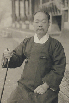 만년의 구당 유길준